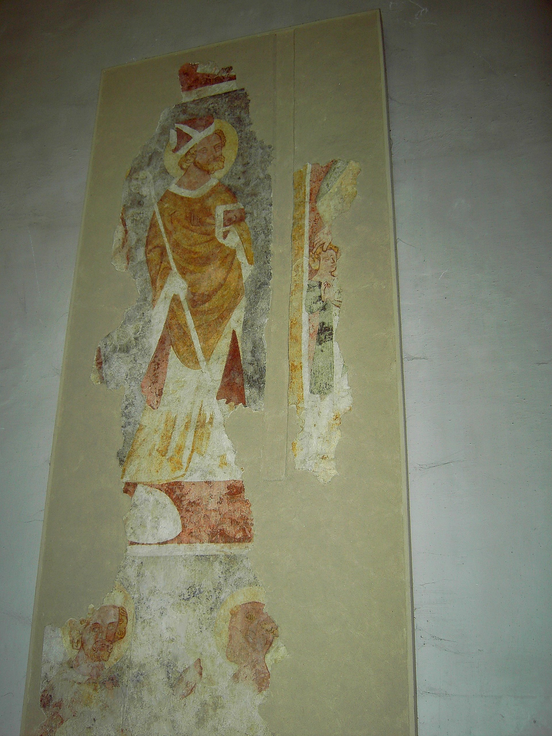 Wandmalereifragmente in der Pfarrkirche St. Katharina in Wenau